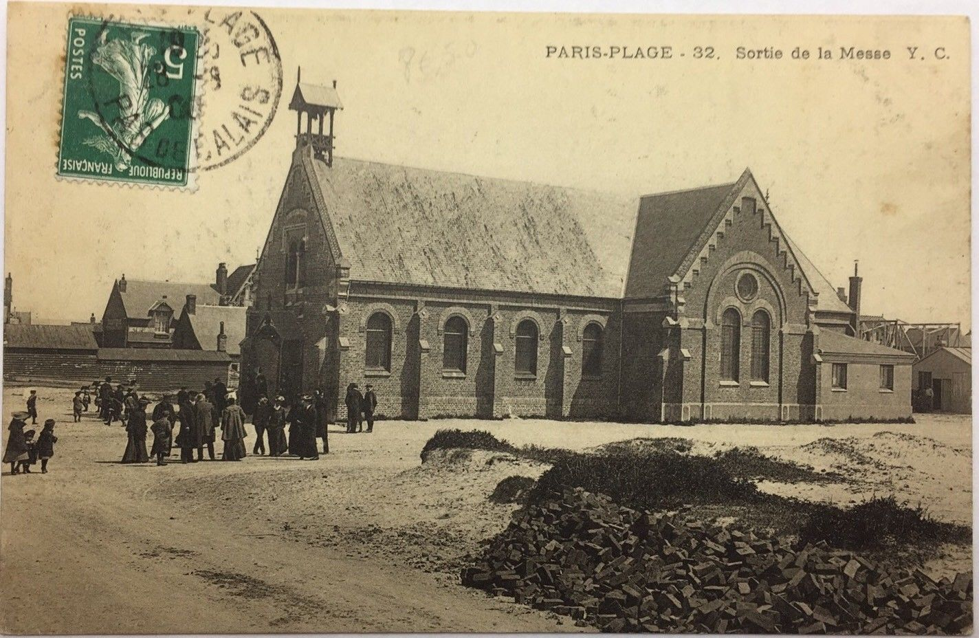 Ancienne église du Touquet en 1900.